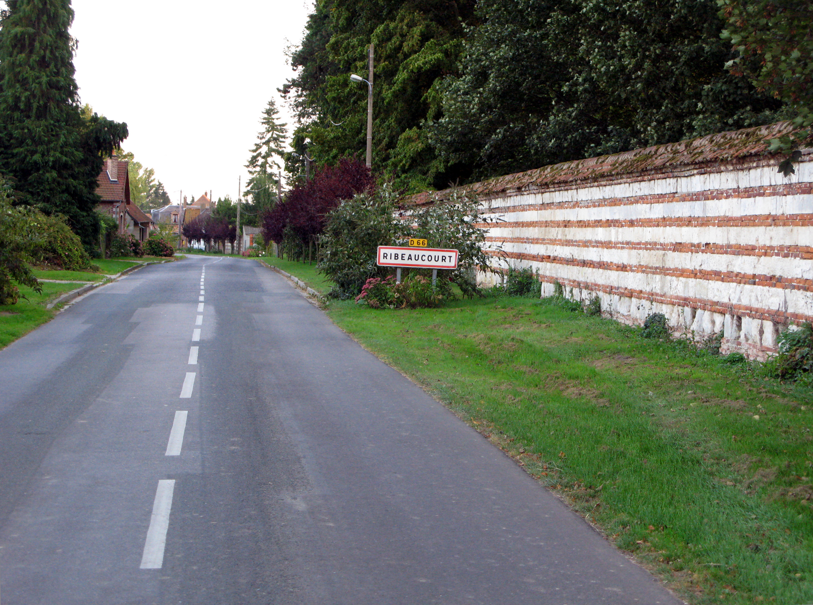 Ribeaucourt (Somme, France) - Panneau à l'entrée du village, contre le mur de la propriété du château.